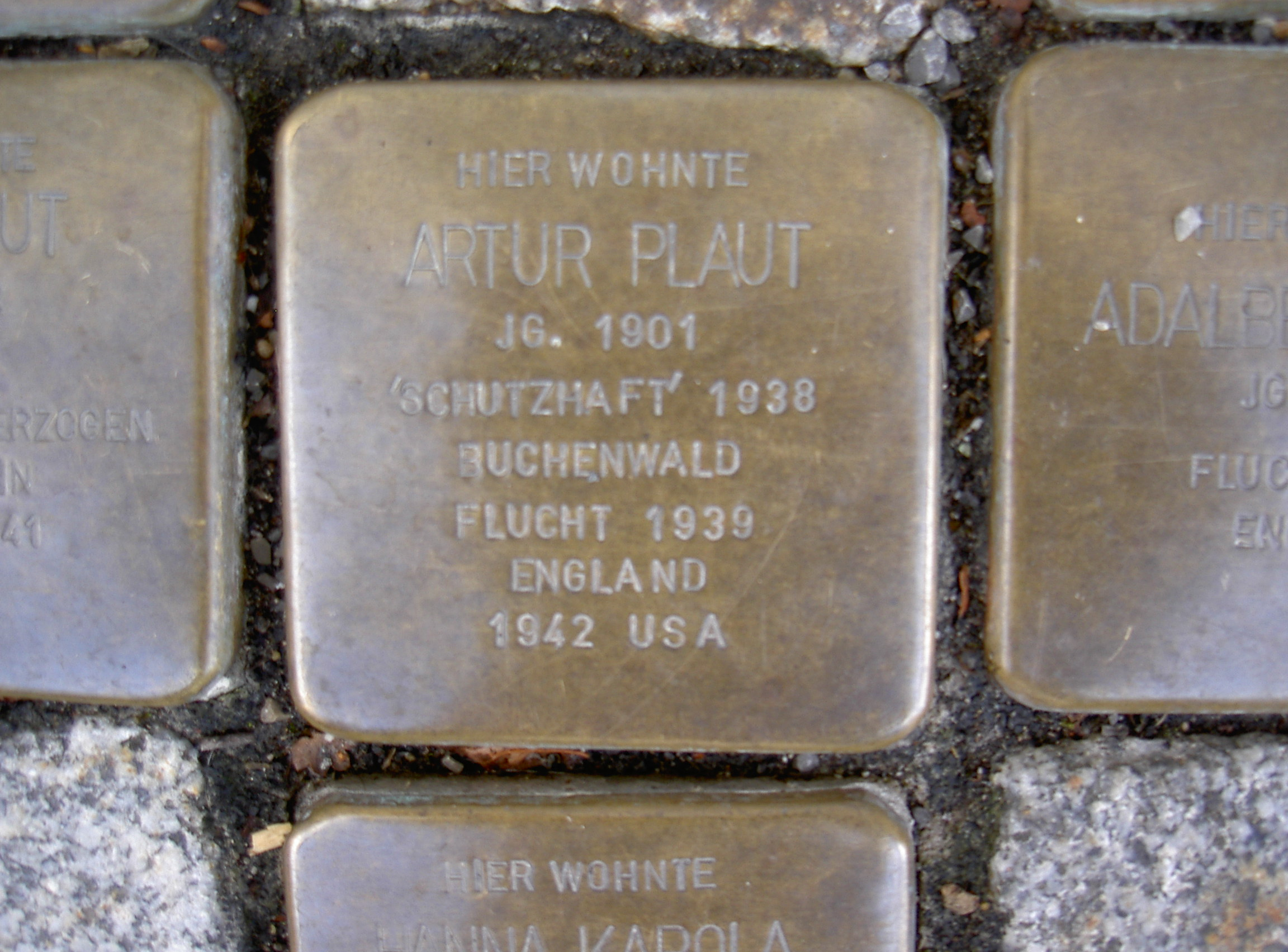 Stolperstein in Themar Markt 8 Plaut Artur